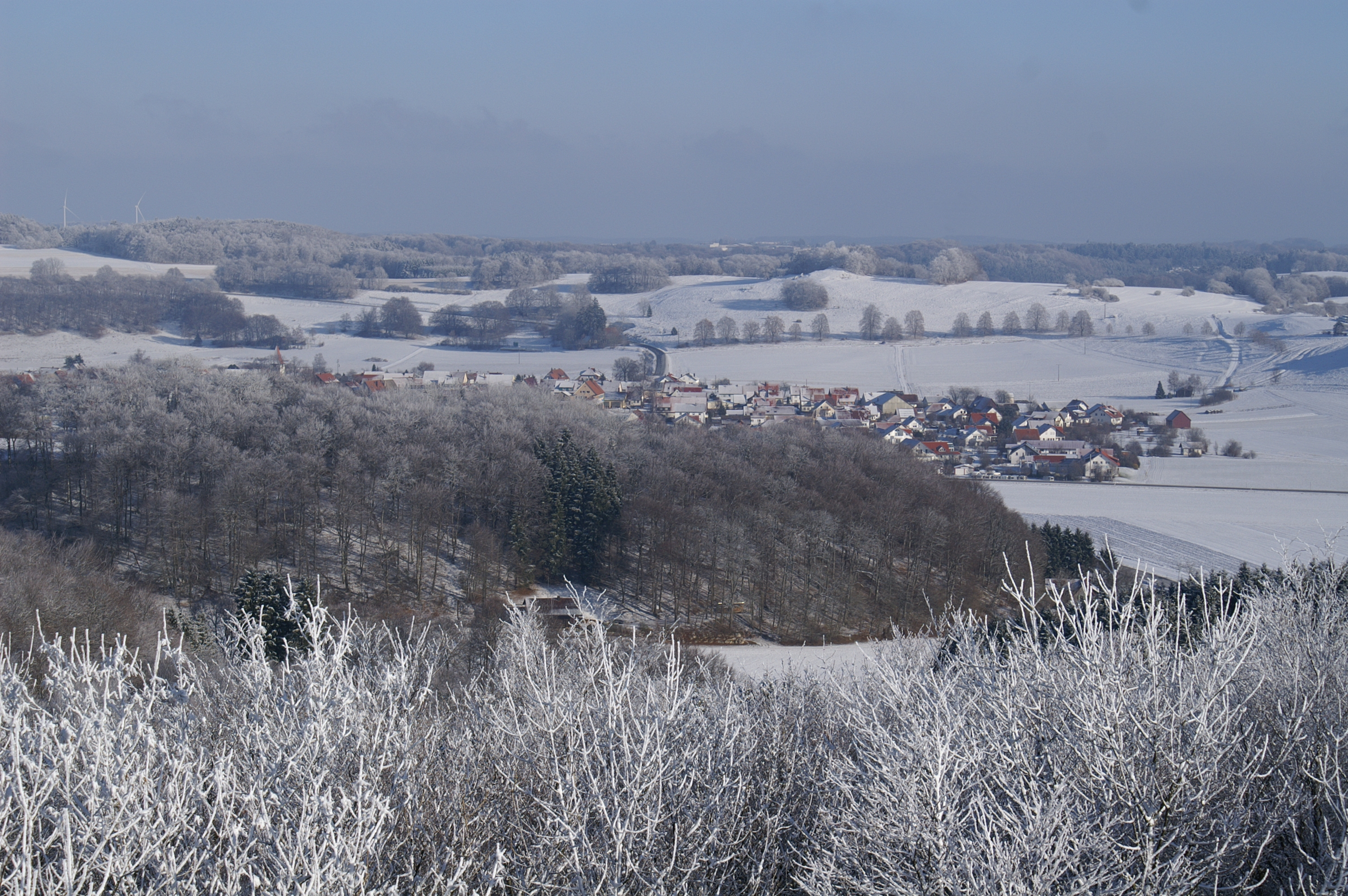 Vom Römersteinturm ist ein Rundblick über die Mittlere Schwäbische Alb möglich. Der sichtbare Ort Donnstetten liegt in der Senke (auf dem Albplateau oft ursprünglich ein Maartrichter) eines schon im Obermiozän erloschen Vulkans vom Typ Schwäbischer Vulkan. Auf dem verkarsteten Albplateau führten Quellen und Hülen der wasserstauenden, residualen Vulkanite bevorzugt zur Besiedlung.